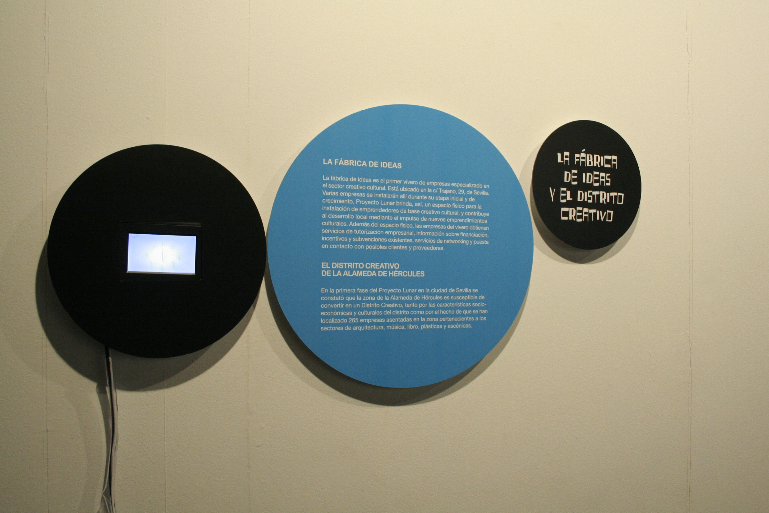 En el dibond negro se proyectaba un motion